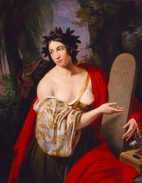 Sibilla Cumana, olio su tela, 122 x 95 cm., Galleria Nazionale, Parma